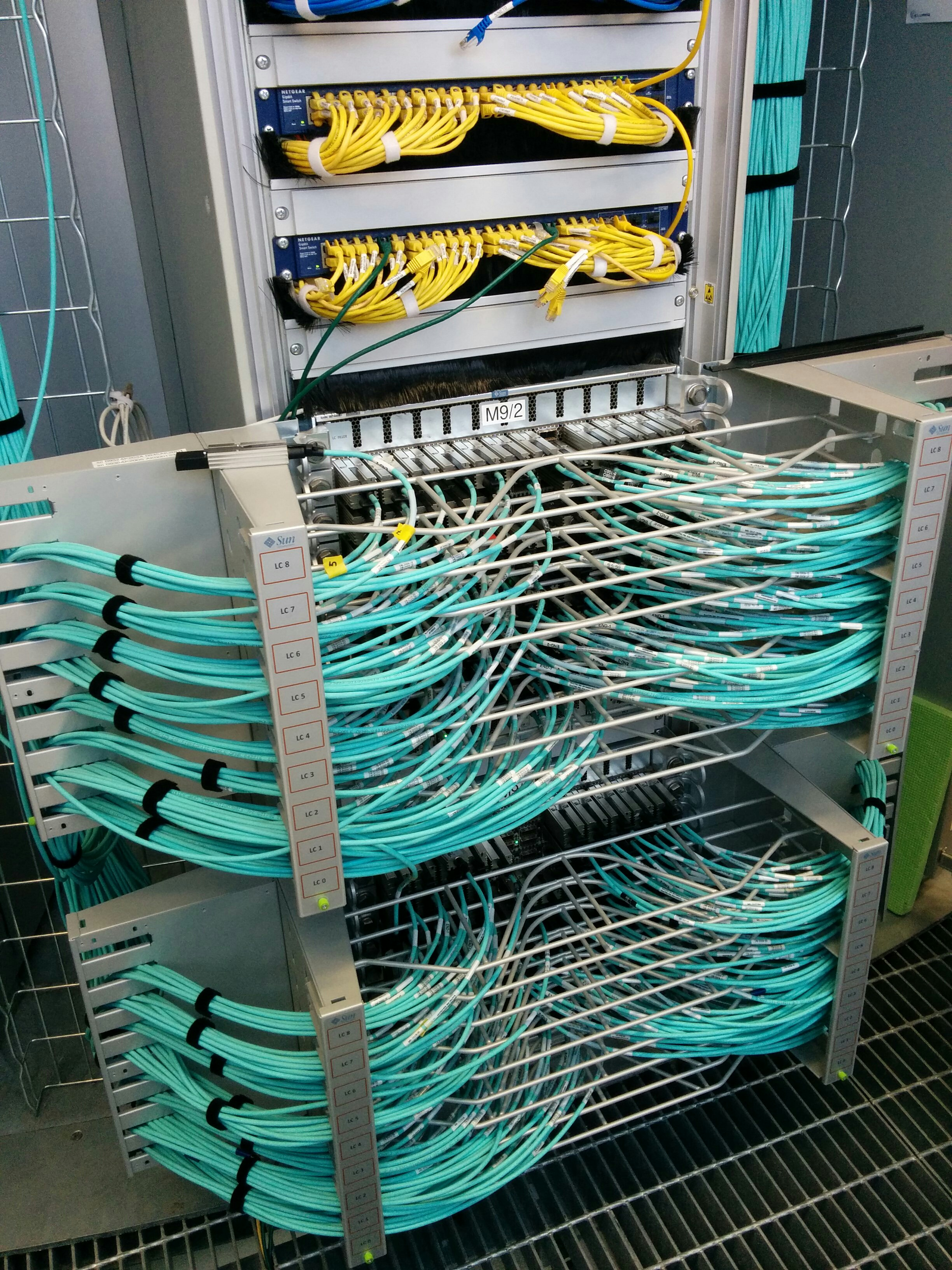 Câblage de fibre optique (au bas en vert), Colosse de Québec